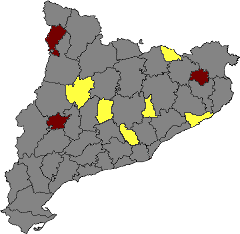 Comarques noves de Catalunya: Vermell: aprovades el 1988 Groc: proposades